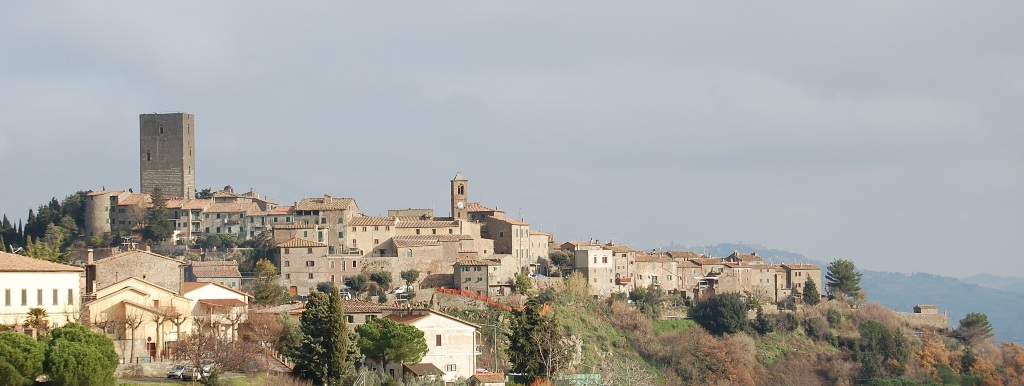 Montecatini Val di Cecina - Veduta del centro storico